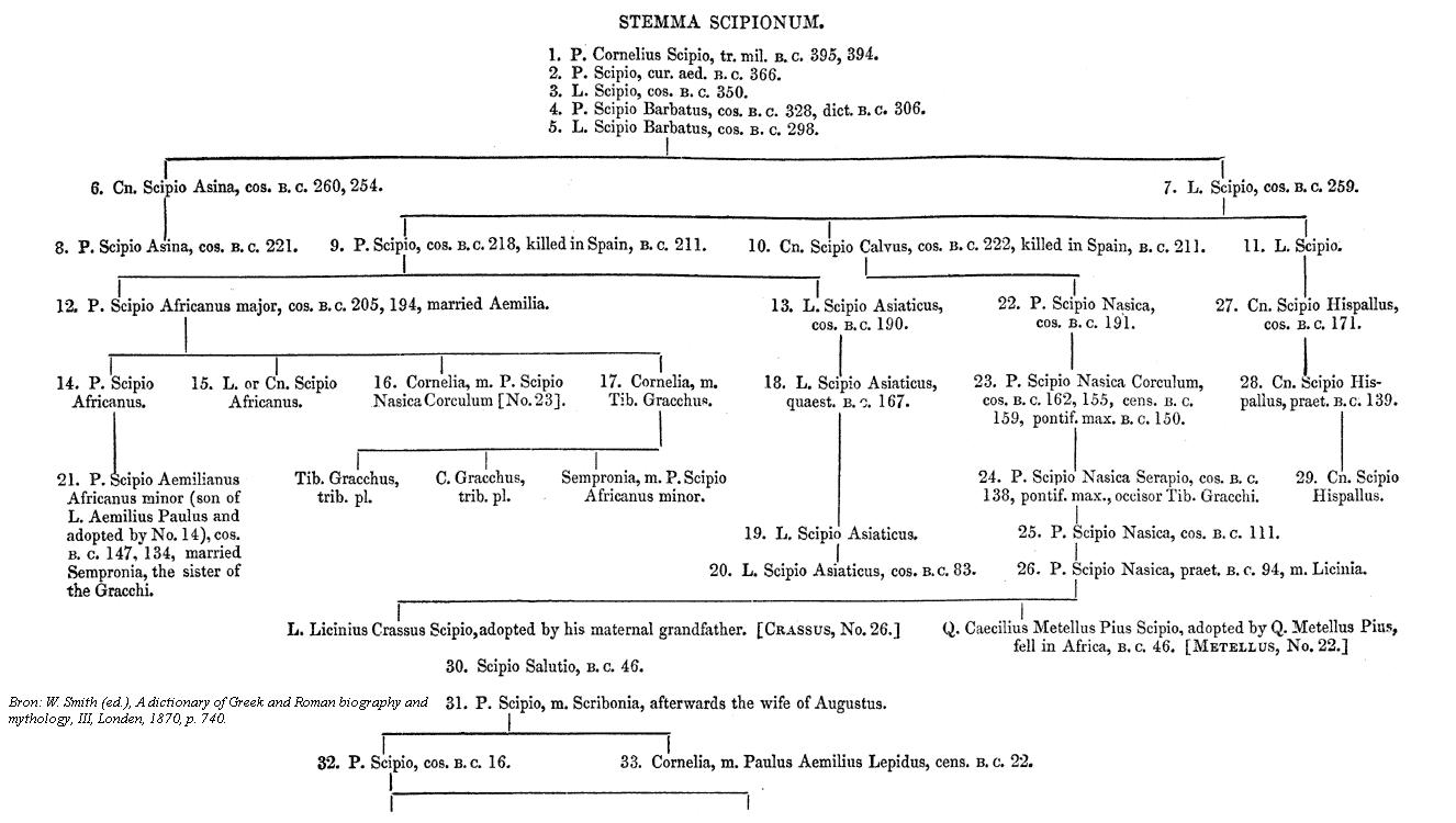 Stamboom Cornelius Scipio